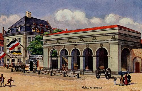 Kolorierte Postkarte mit gezeichneter Ansicht der Preußischen Hauptwache (um 1900)